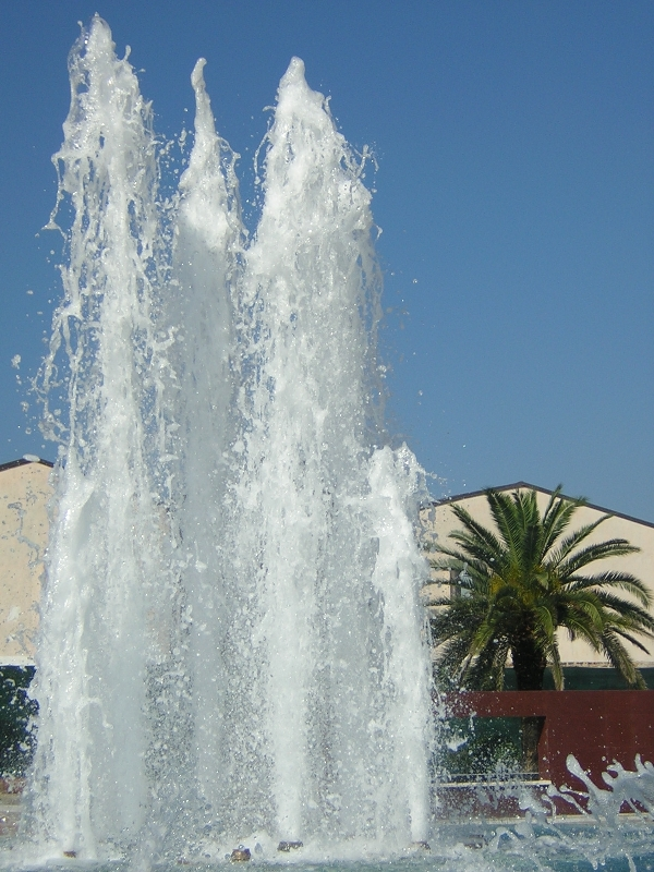 Podgorica